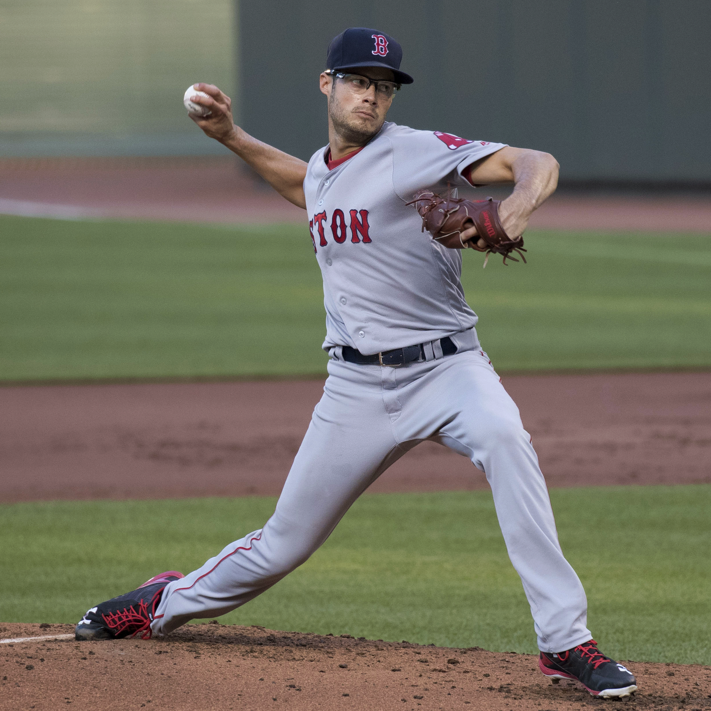 Joe Kelly